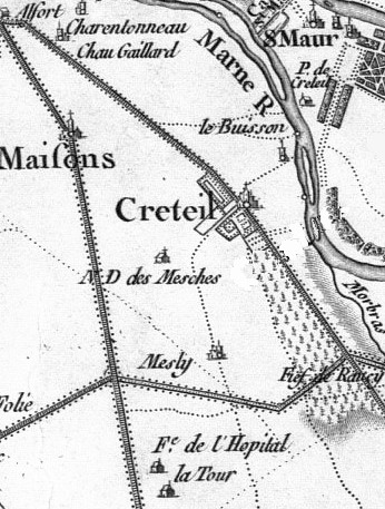 Détail de la carte de Cassini datant de 1750 centré sur Créteil afin d'illustrer l'article consacré à cette commune. Domaine Public. Licensing Catégorie:Cartes Histoire de France